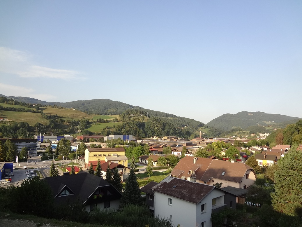 Razgled čez Dobjo vas